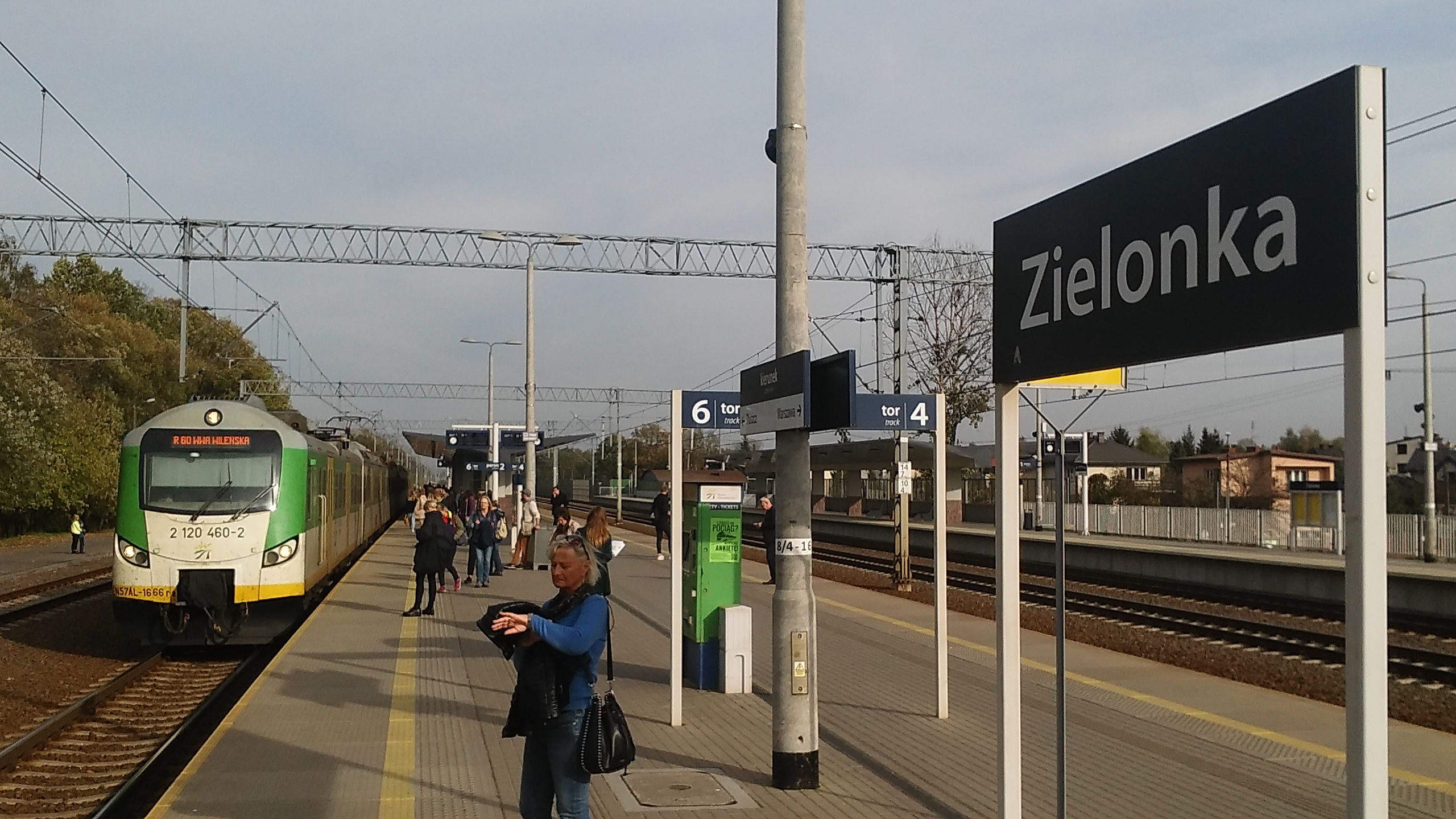 stacja kolejowa Zielonka - peron 2 i pociąg osobowy Kolei Mazowieckich KM 11776 relacji Tłuszcz - Warszawa Wileńska